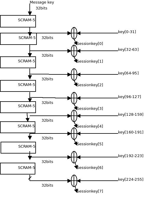 Блок-схема PALS3